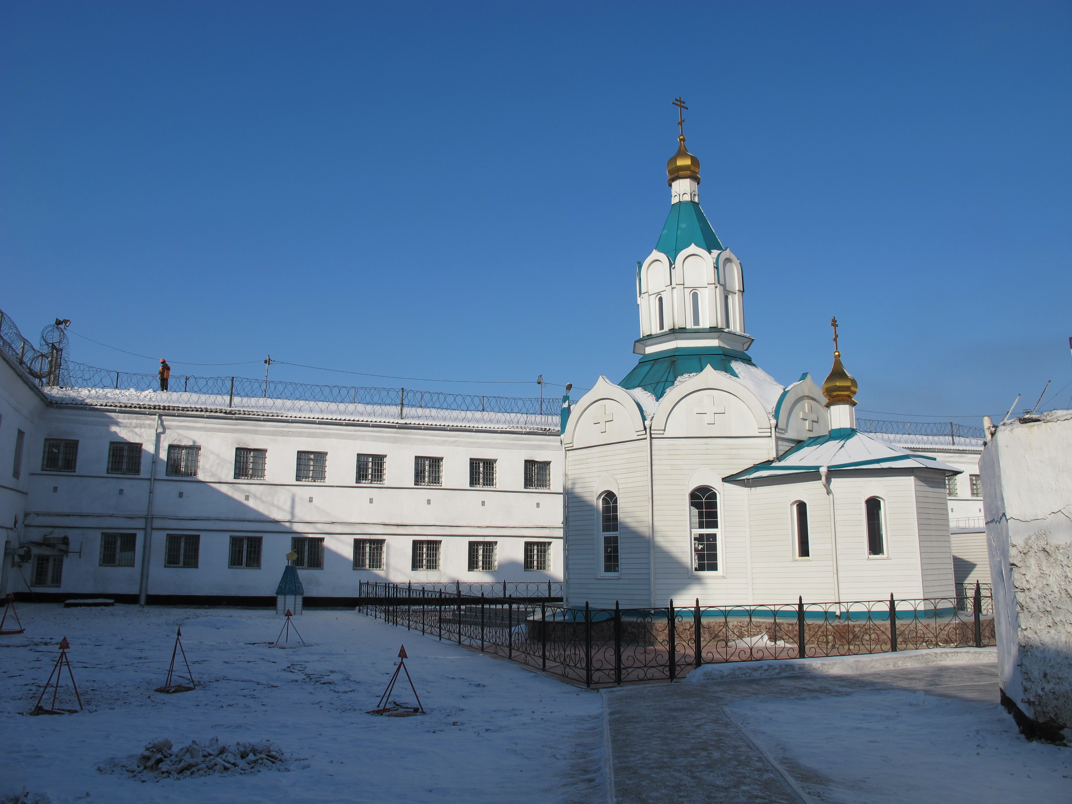 Внутренний двор и церковь в Иркутской тюрьме